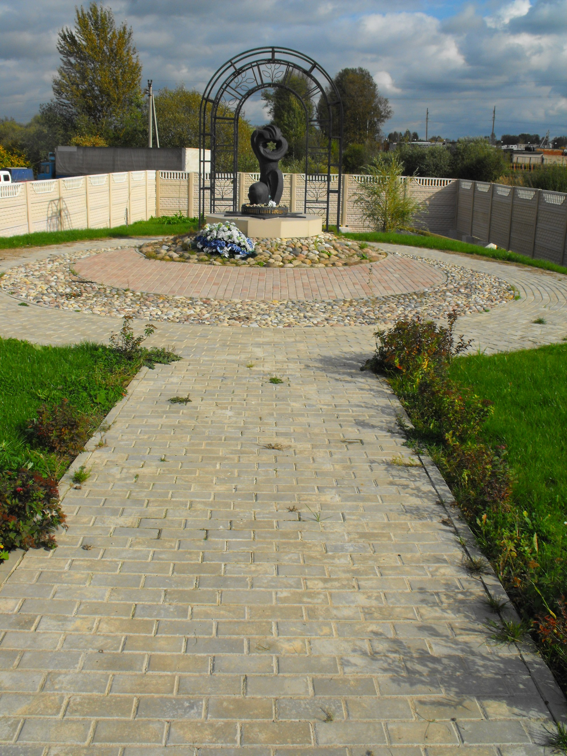 Мемориальный комплекс на месте убийства нацистами около 10000 витебских еврее - узников гетто около бывшей пригородной деревни Себяхи в Иловском (Туловском) рву. Находится слева от дороги на выезде из Витебска с улицы Лазо (в сторону деревни Тулово). Установлен 25 июня 2010 года.